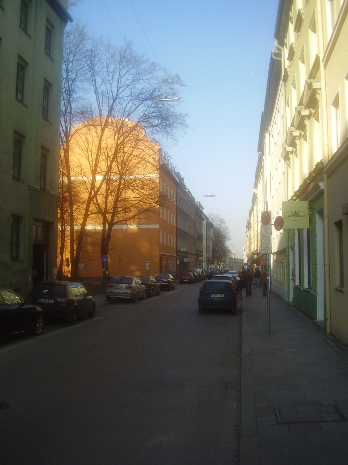 Schleißheimer Straße, Ansicht von der Gabelsbergerstraße in Richtung Norden, München